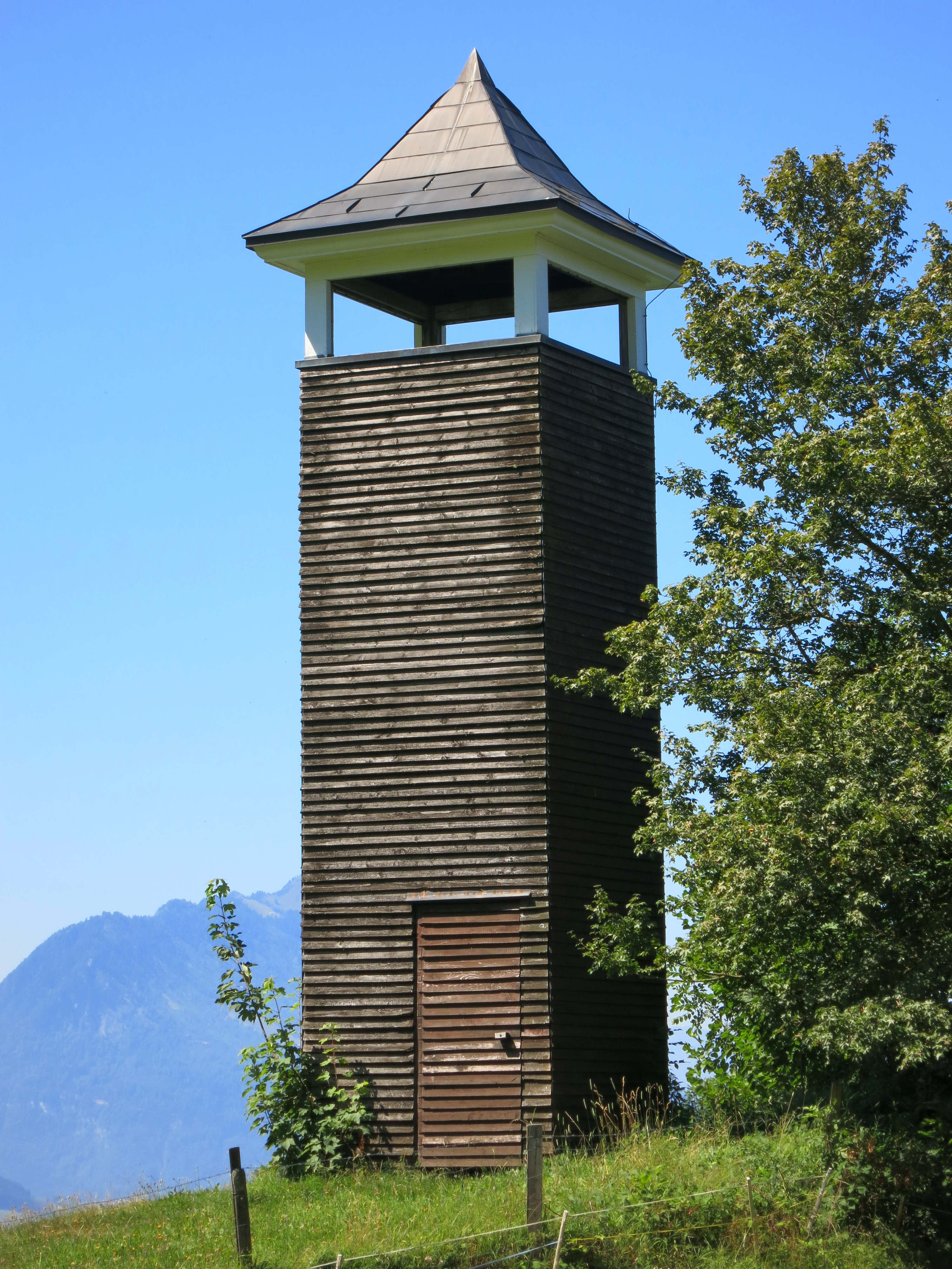 Wissifluehturm